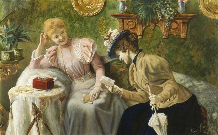 Zwei Damen, Gouache, 22 x 36 cm, 1898